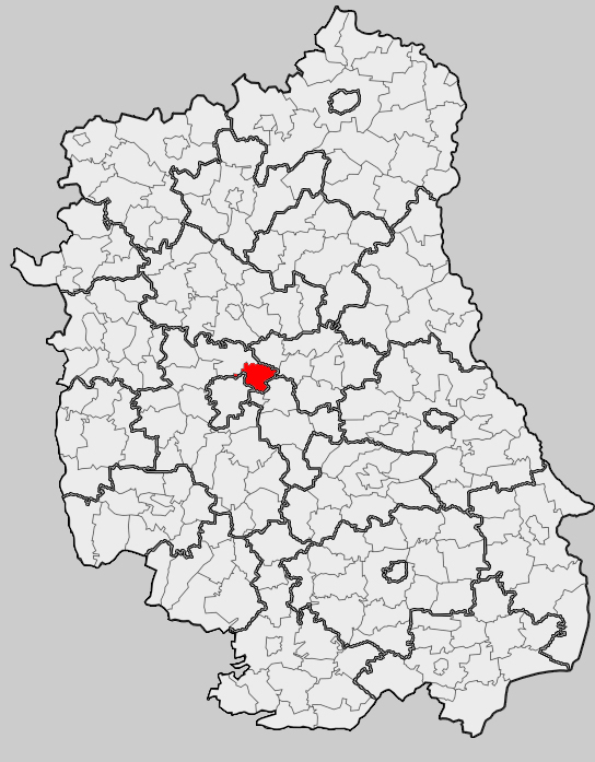 Map of gmina Wólka, Lublin county, Lublin voivodeship Mapa gminy Wólka, powiat lubelski, województwo lubelskie